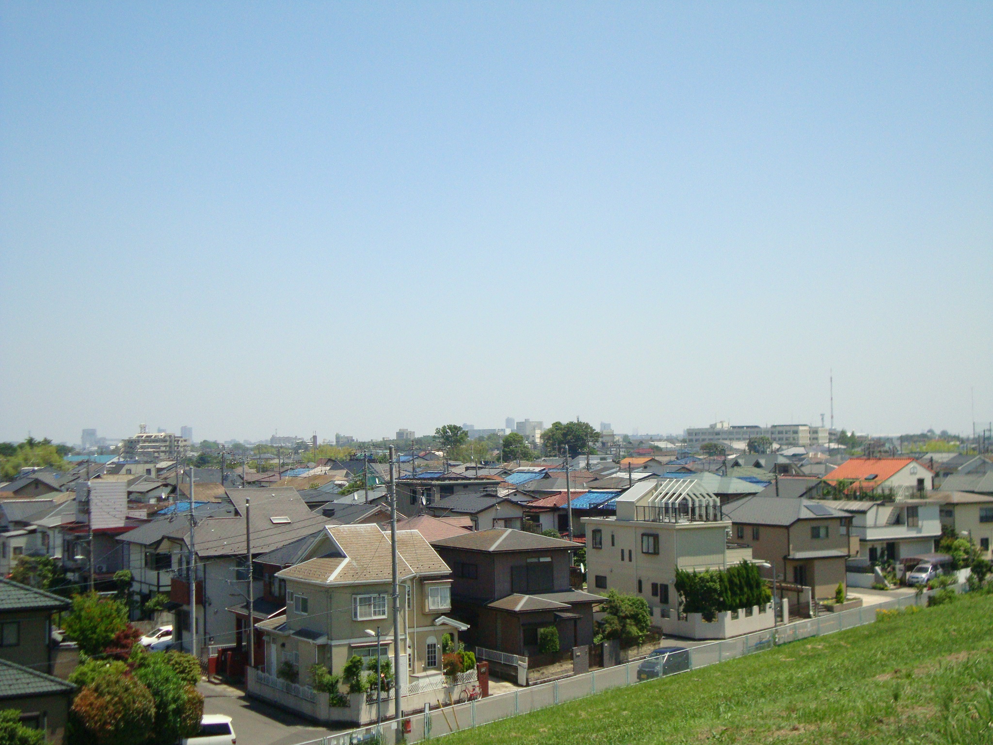 埼玉県さいたま市桜区の住宅街。荒川堤防上より撮影。